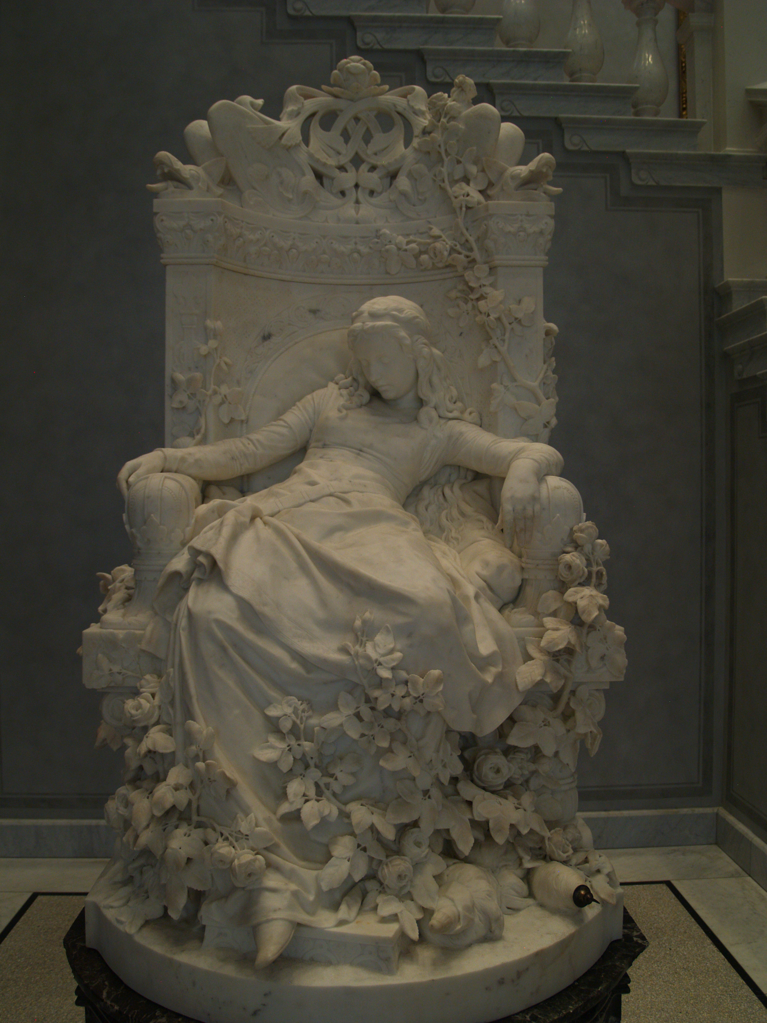 Berlín, Alte Nationalgalerie. La Bella durmiente, Louis Sussmann-Hellborn